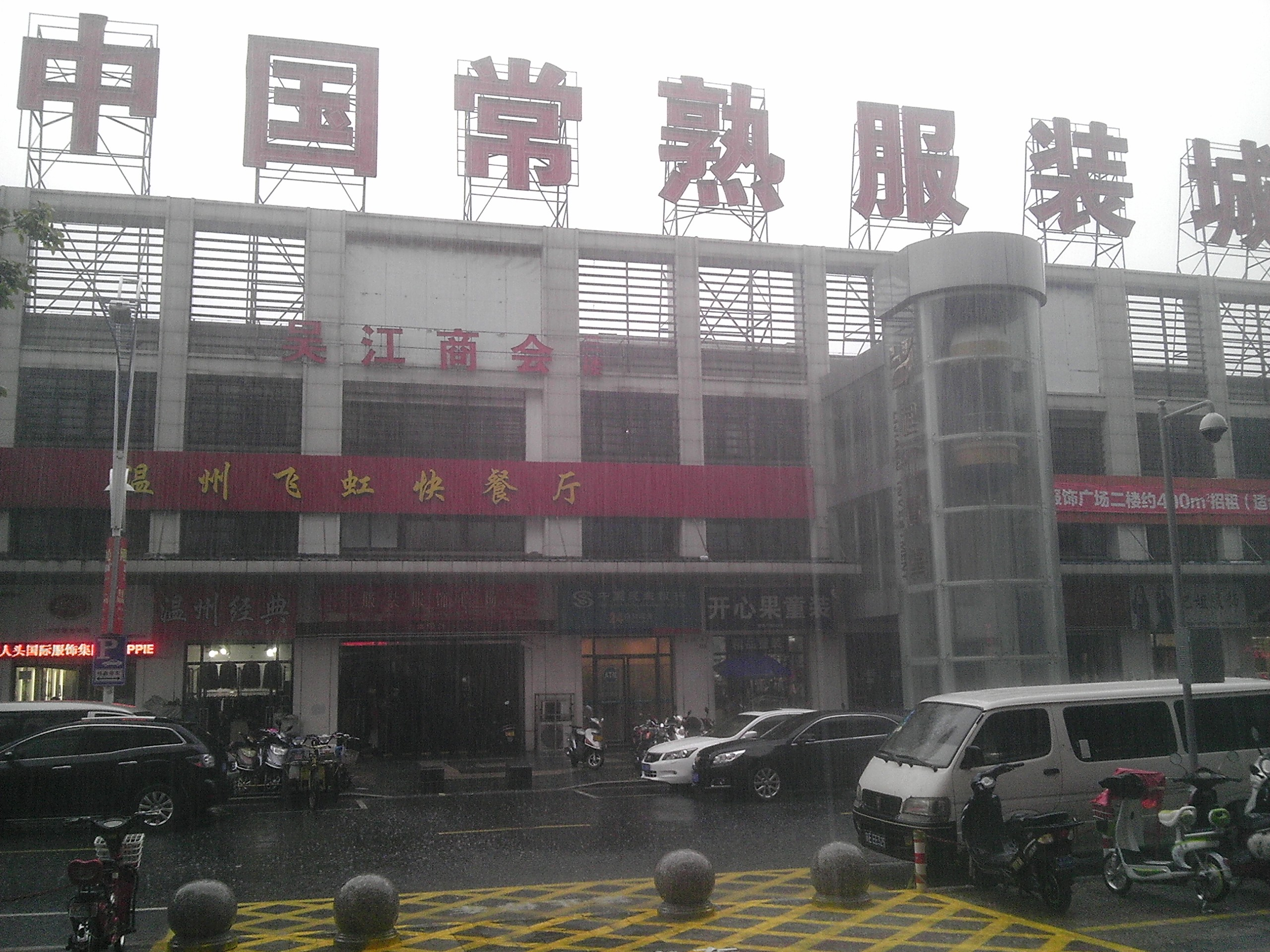 Changshu, Suzhou, Jiangsu, China